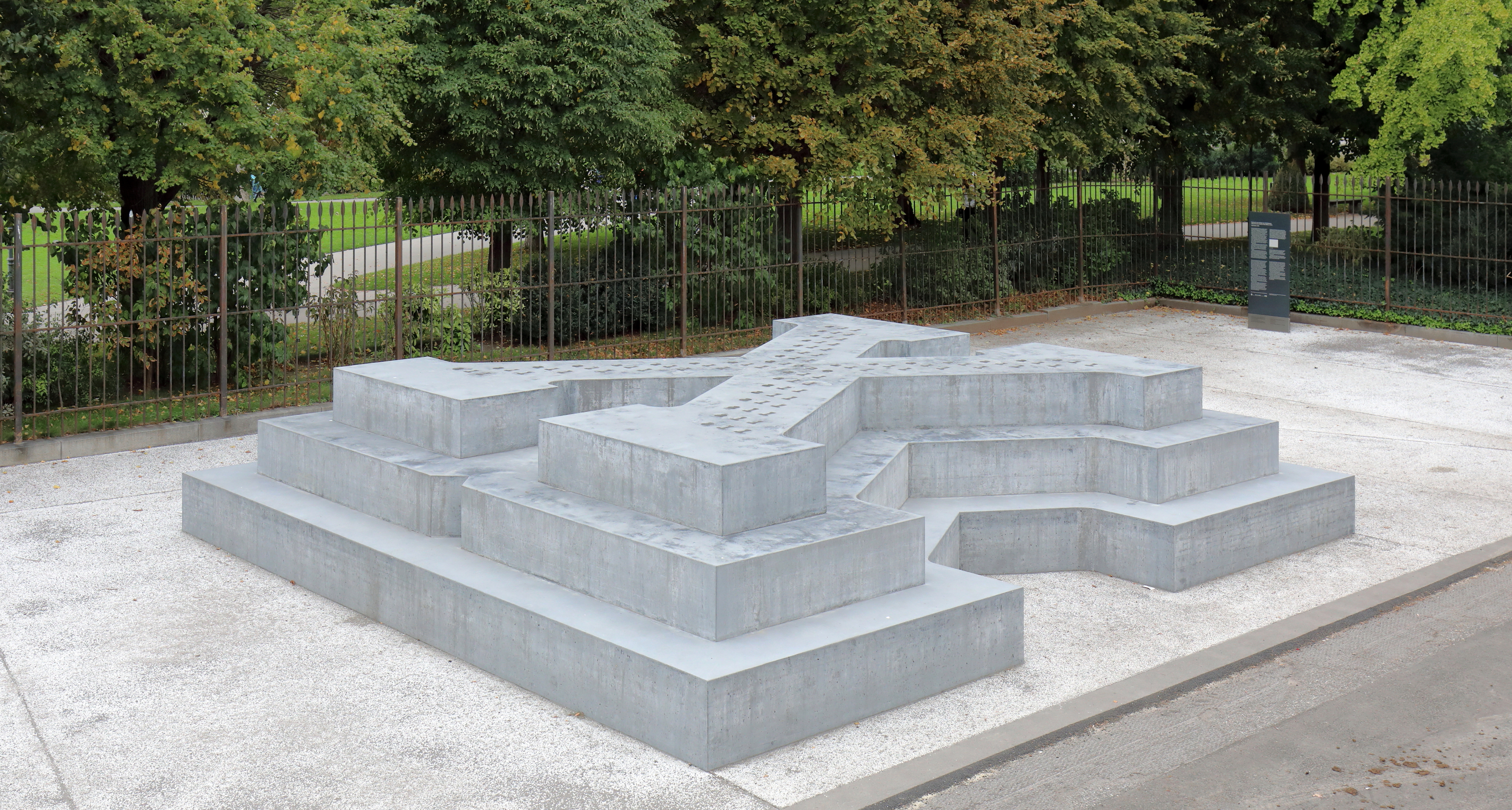 Das Denkmal für Deserteure, auch als „Denkmal für die Verfolgten der NS-Militärjustiz“ bezeichnet, am Ballhausplatz im 1. Wiener Gemeindebezirk Innere Stadt und im Hintergrund der Volksgarten.Eine leicht bläulich eingefärbte Beton-Skulptur des deutschen Künstlers Olaf Nicolai, die von der gemeindeeigenen Firma Kunst im Öffentlichen Raum GmbH (KÖR) mit einem Gesamtbudget von 220.000 Euro errichtet wurde. Das dreistufige liegende X mit der 32-fachen Inschrift „all“ und einmal „alone“ oben auf wurde am 24. Oktober 2014 durch einen Festakt am Ballhausplatz der Öffentlichkeit präsentiert. Es ist knapp zehn Meter lang, 8,8 Meter breit und 1,65 Meter hoch.